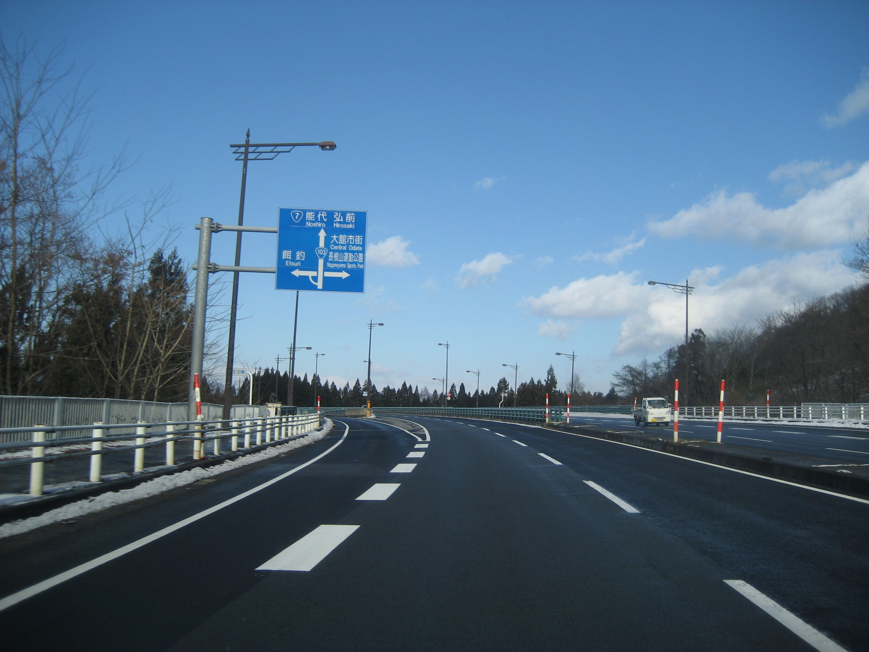 国道103号線大館南バイパス秋田県大館市餌釣ランプ付近（大館南IC方向を撮影）